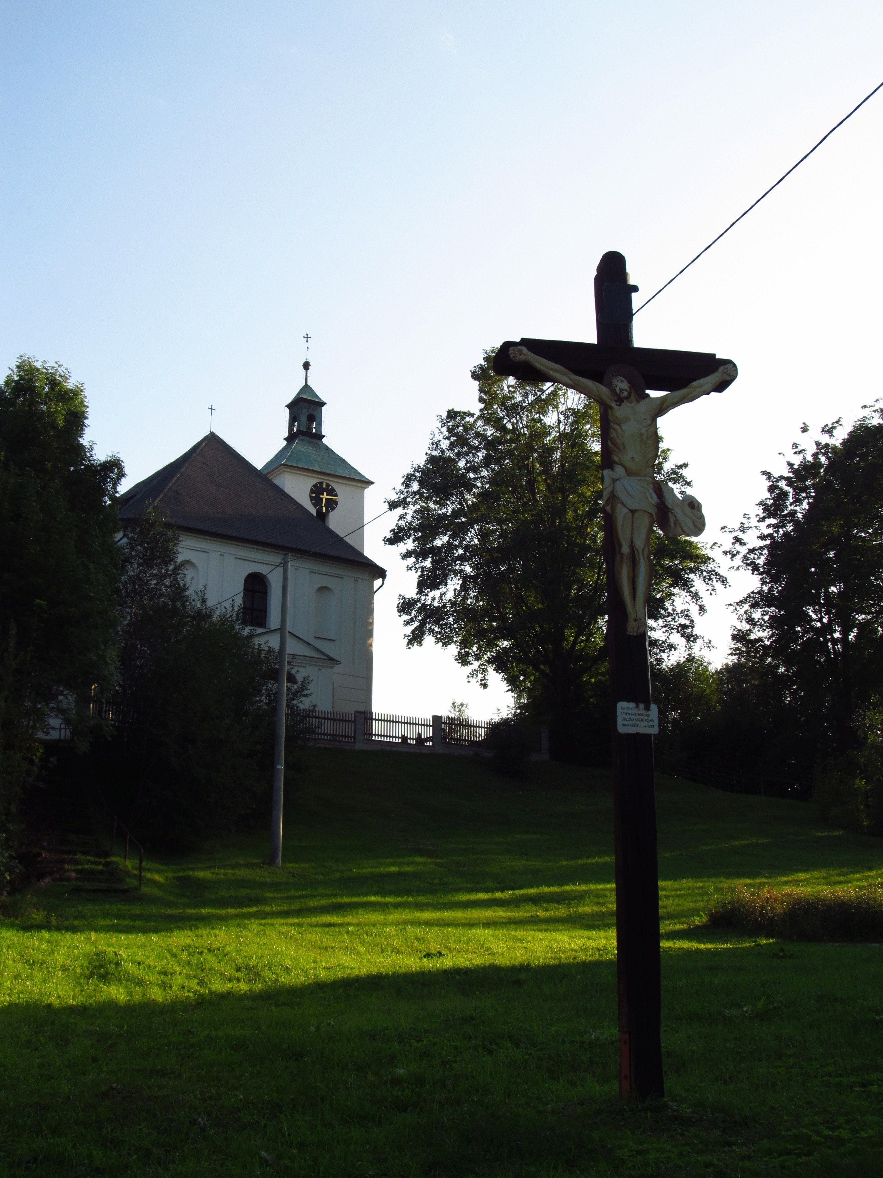 Kostel svatého Jakuba Staršího, Dolní Moravice.